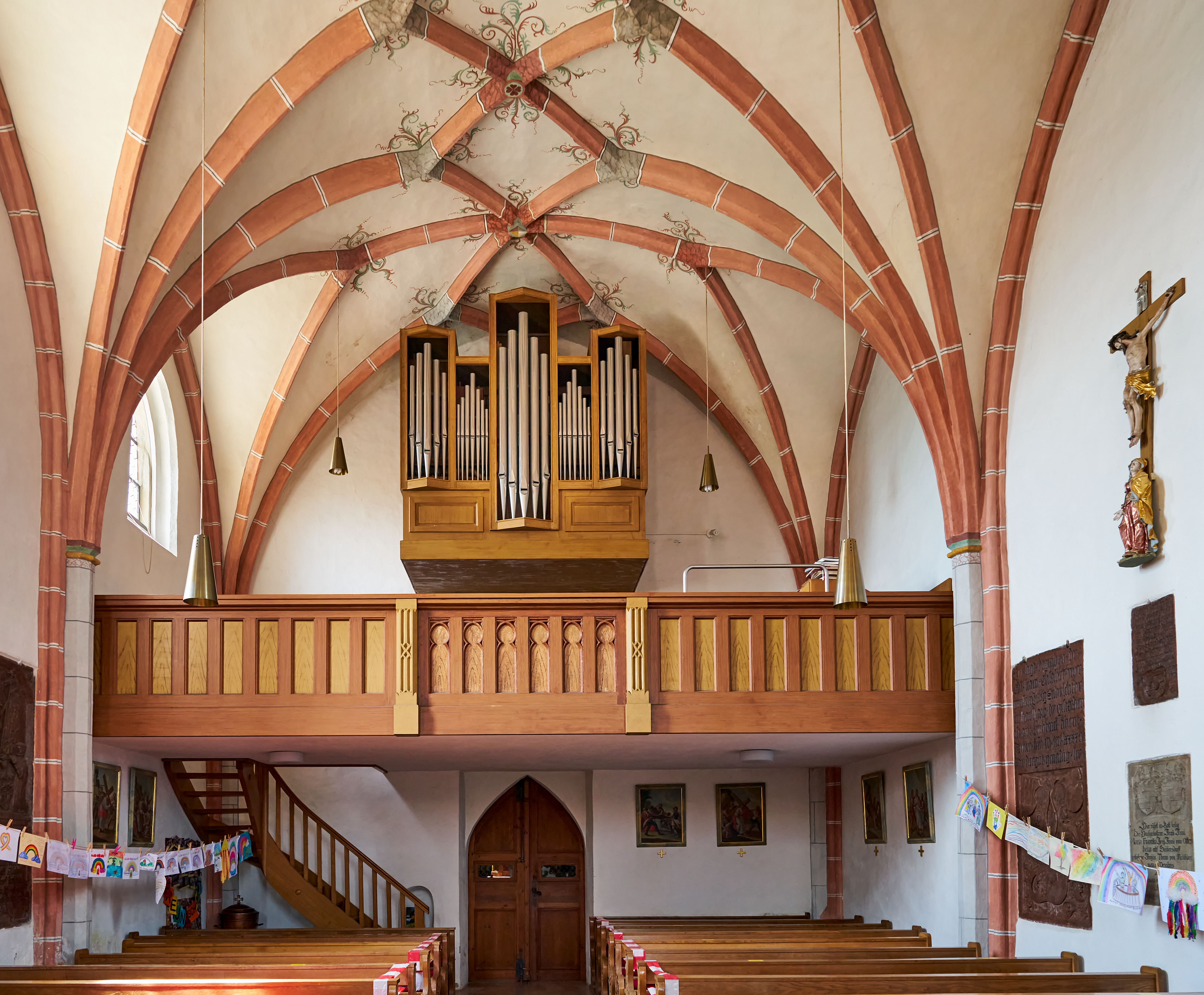 Katholische Filialkirche St. Jakobus der Ältere, Seibersdorf Kirchdorf am Inn, Empore